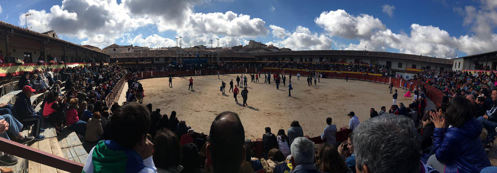 Imagen panorámica de la Plaza Mayor durante los festejos taurinos de Mayo de 2017